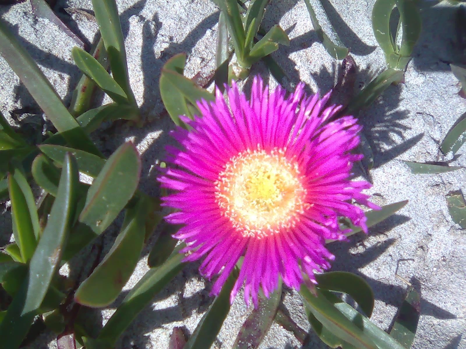 Doca florecida, imagen tomada el 11 de abril de 2010 en las dunas de playa Sabón, la flor es: Familia: Aizoaceae. Género: Carpobrotus. Especie: Carpobrotus aequilaterus. Comunmente llamada Doca